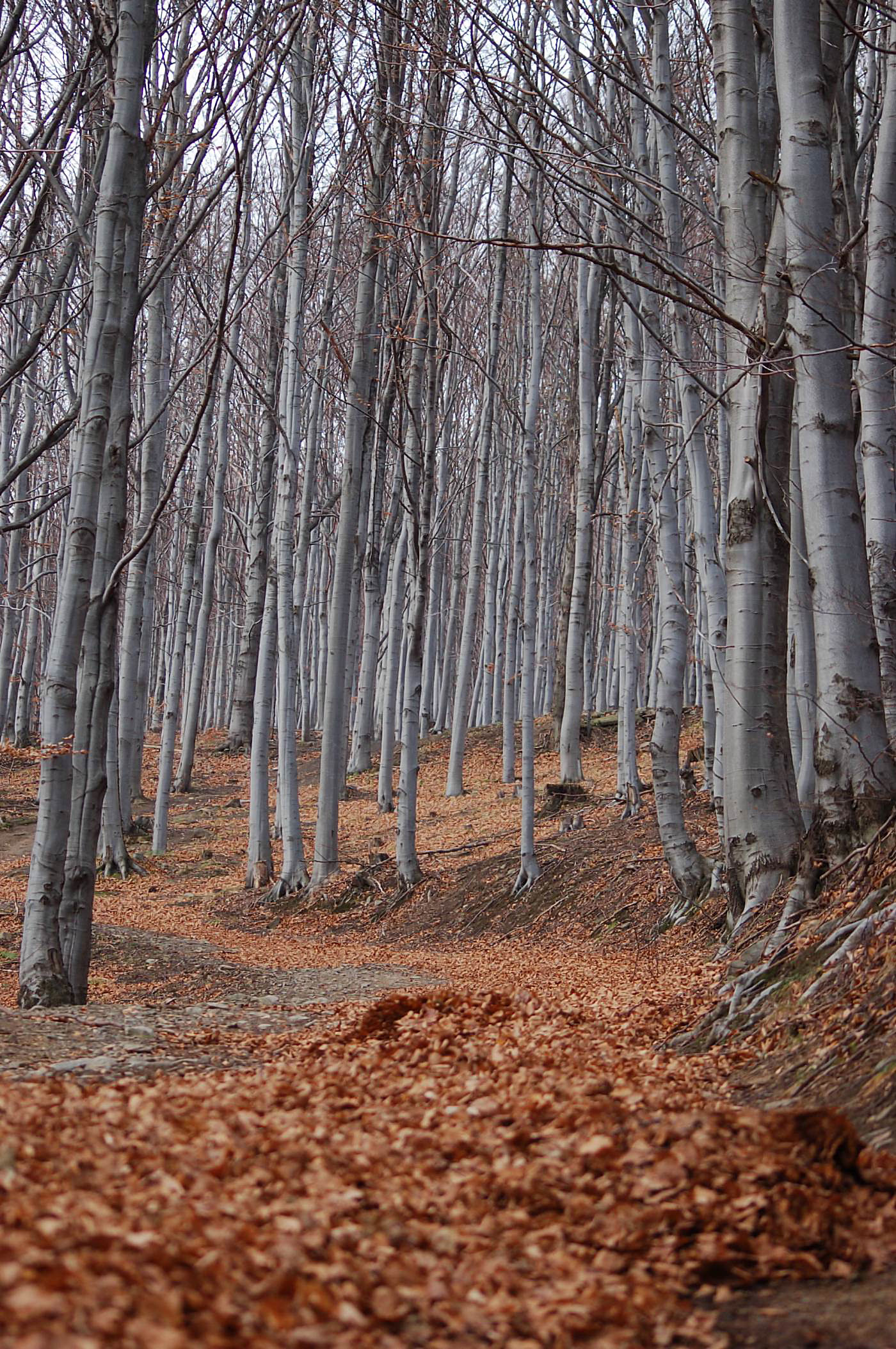 Fagus sylvatica in Sudety Polska